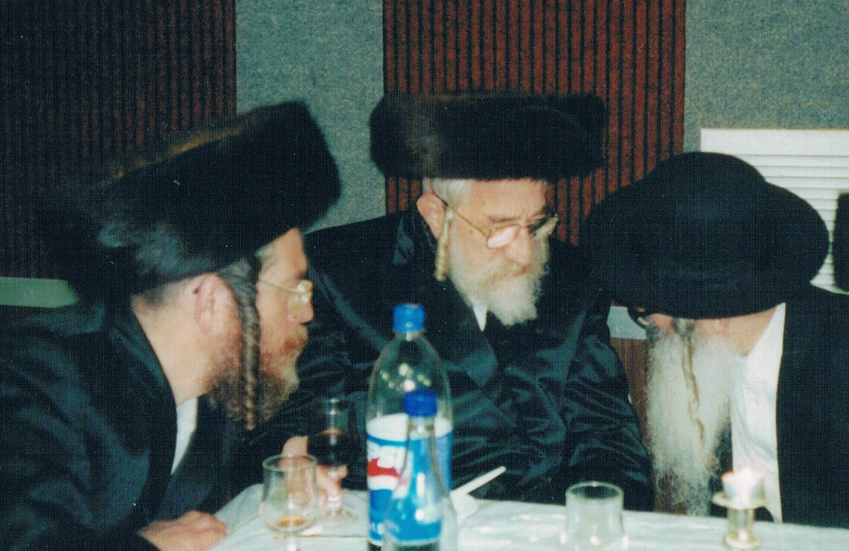 עם האדמו"ר מאמשינוב שליט"א